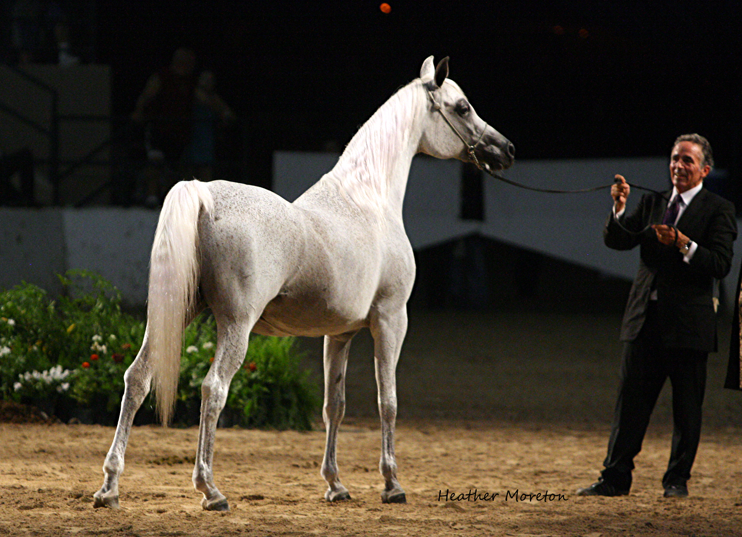 Egyptian Arabian Mare